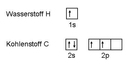 H und C in Kästchenschreibweise